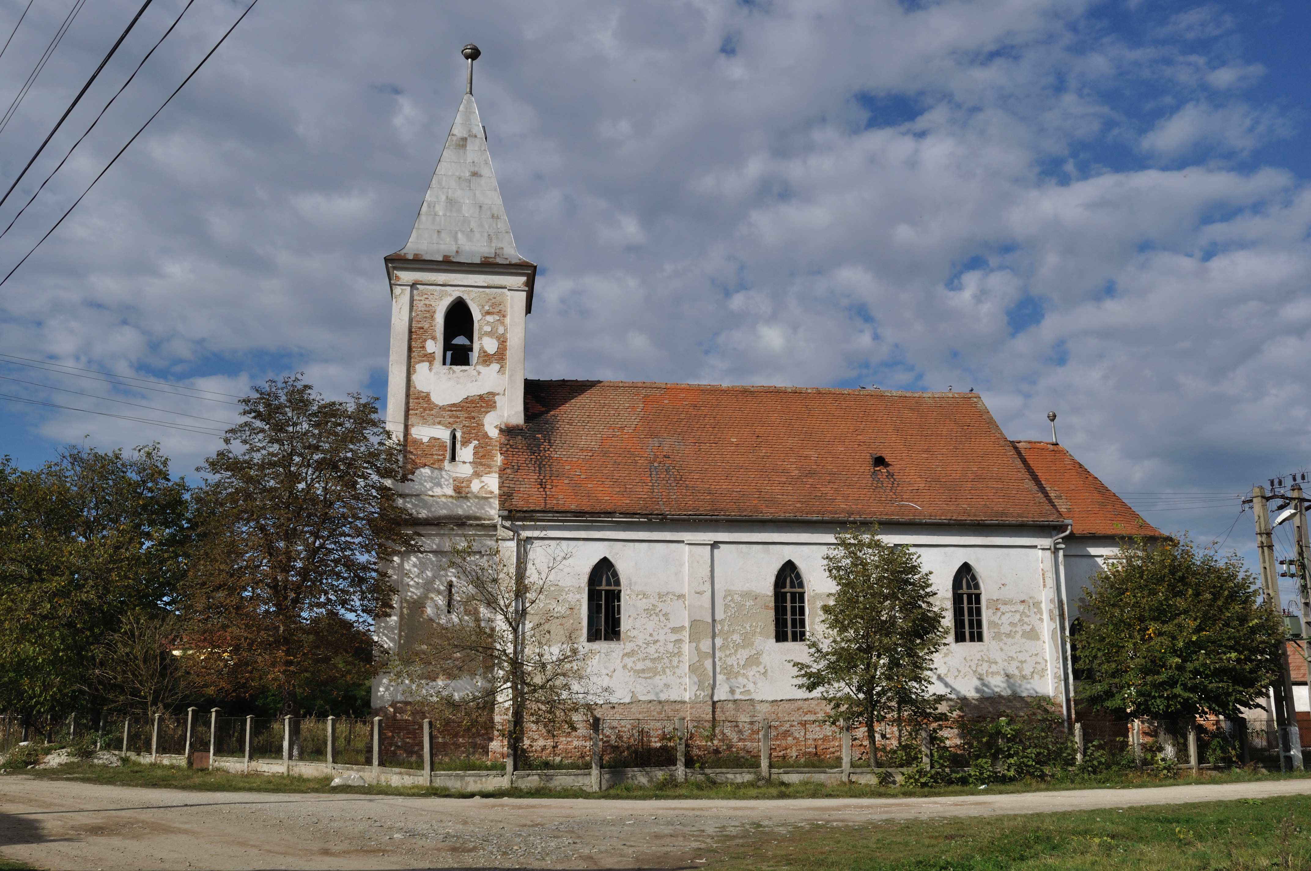 Șoroștin, județul Sibiu